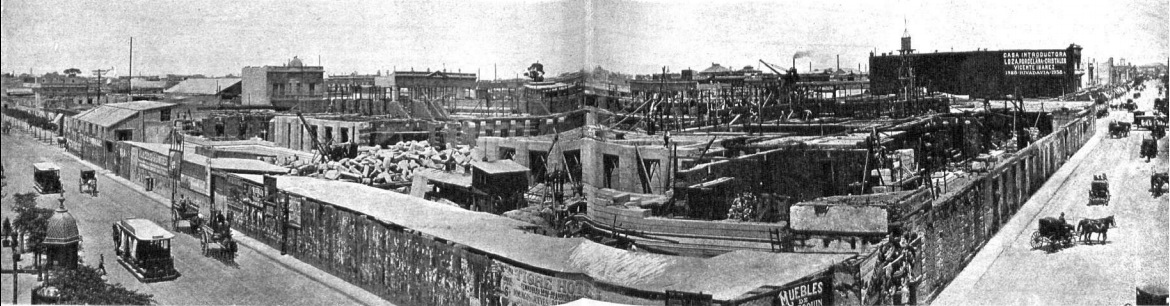 Construcción del Palacio del Congreso de la Nación Argentina en enero de 1899. Buenos Aires, Argentina.